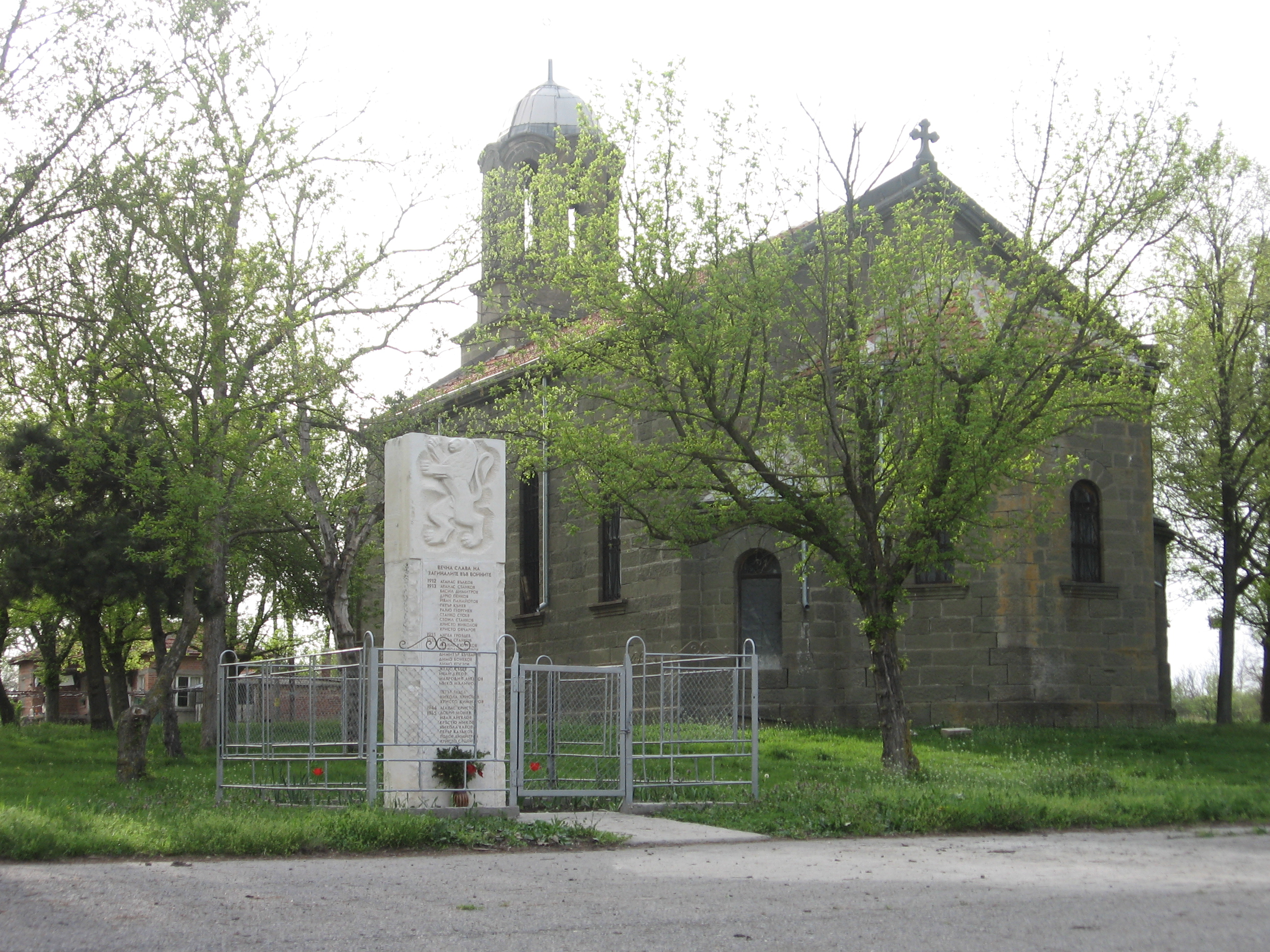 Православната църква и паметника на загиналите във войните